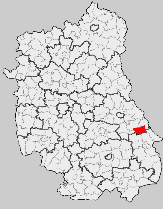 Map of gmina Białopole, Chełm county, Lublin voivodship Mapa gminy Białopole, powiat chełmski, województwo lubelskie